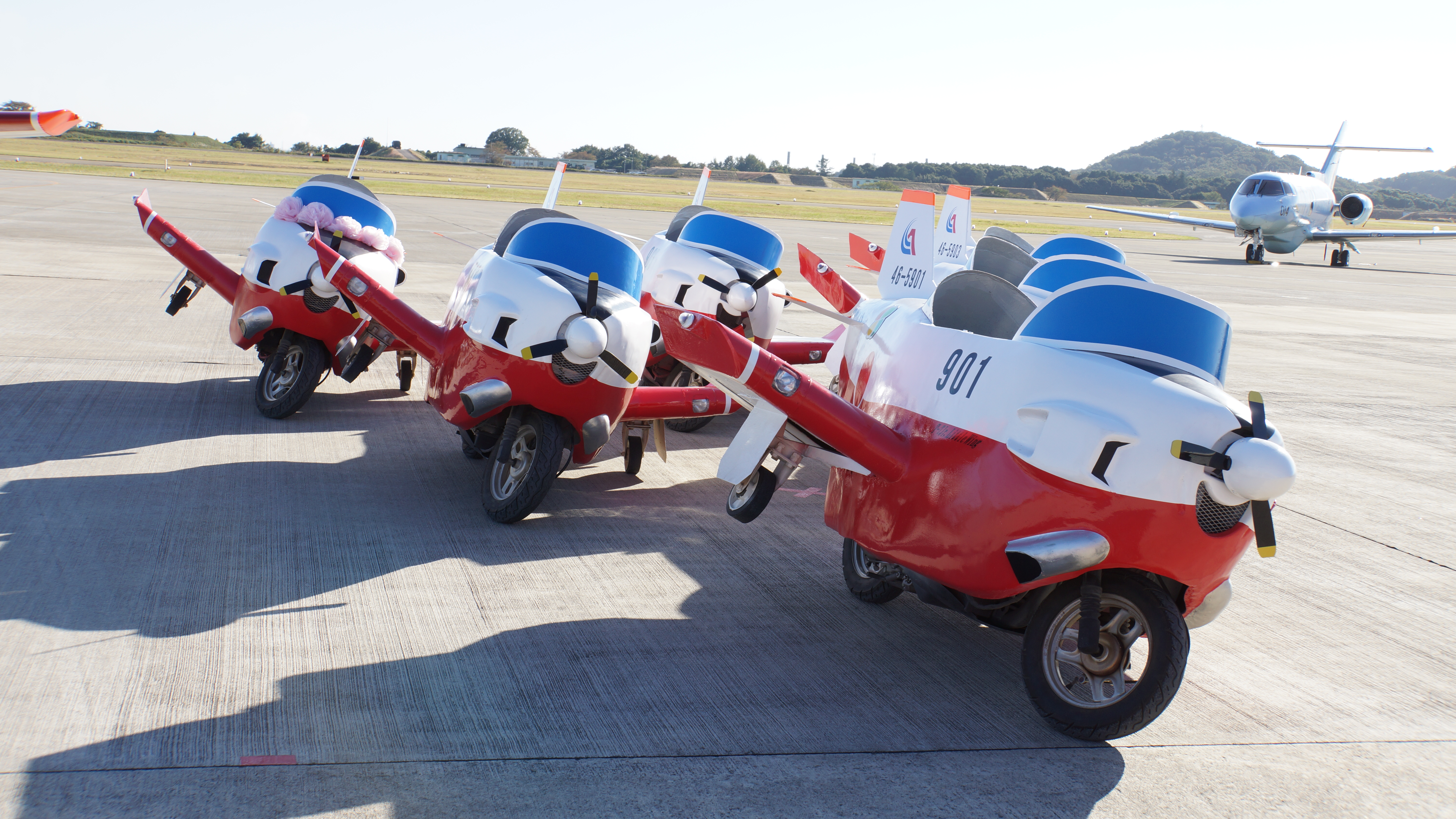 航空自衛隊 T-7Jr（リトルウィング）。 15年10月25日 岐阜基地にて。